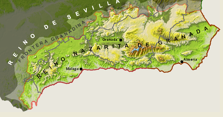 Mapa del reino nazarita de Granada.